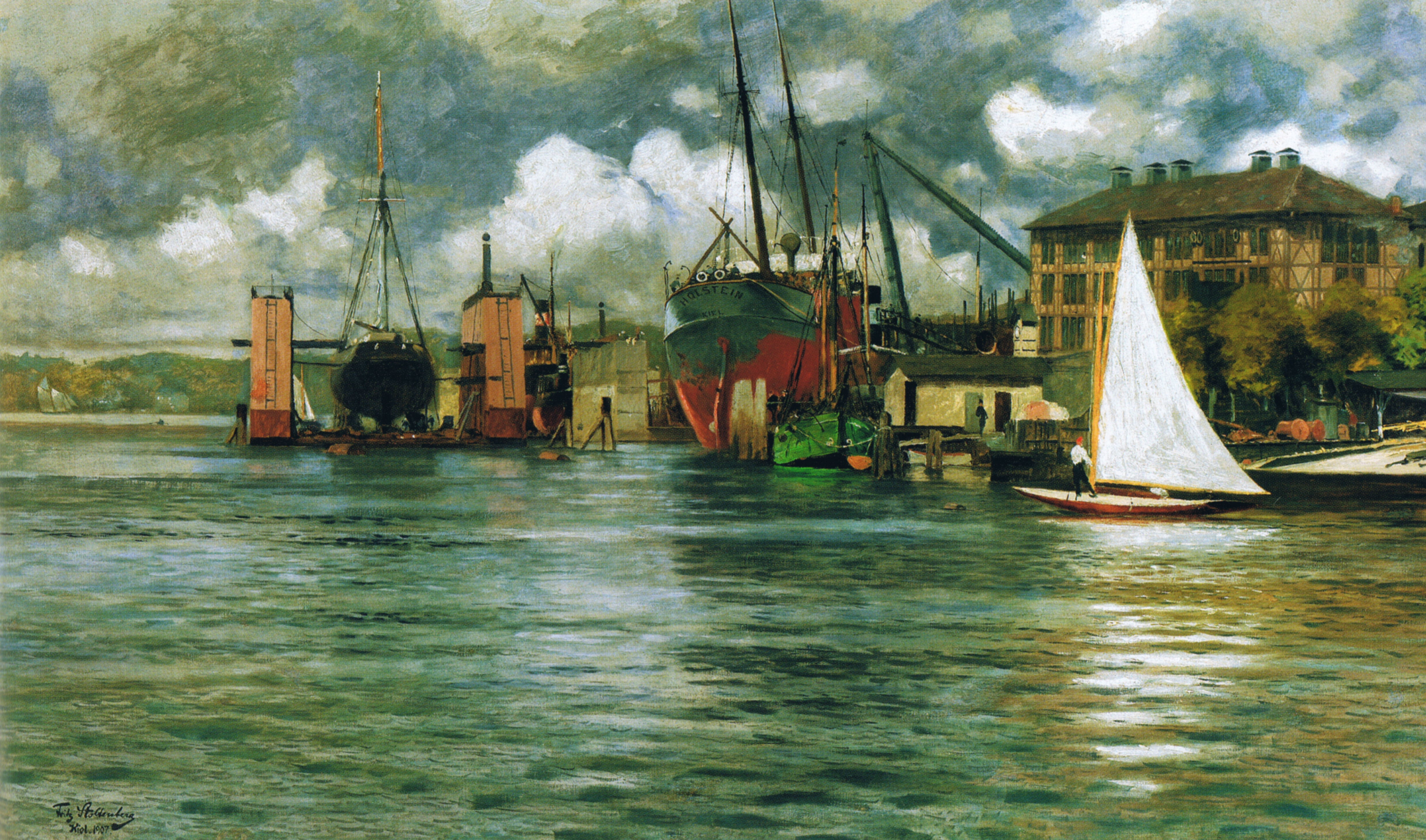 Die Howaldswerke in Kiel, Gemälde von Fritz Stoltenberg